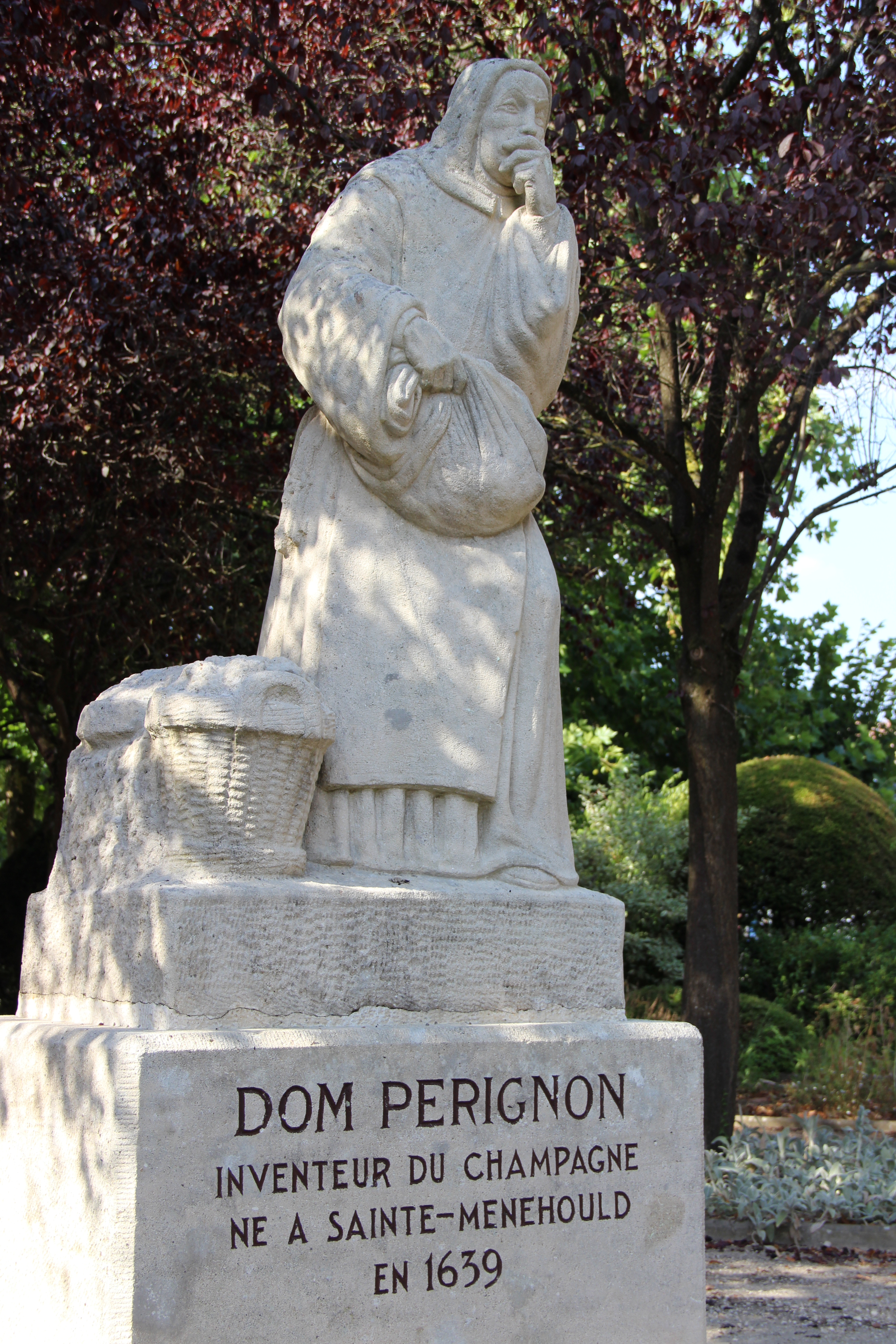 La statue de Dom Pérignon